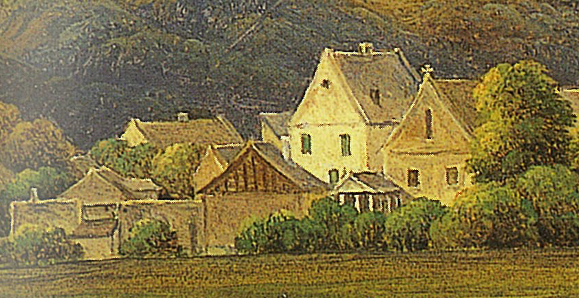 Detaildarstellung Kaisersteinbruch 1842